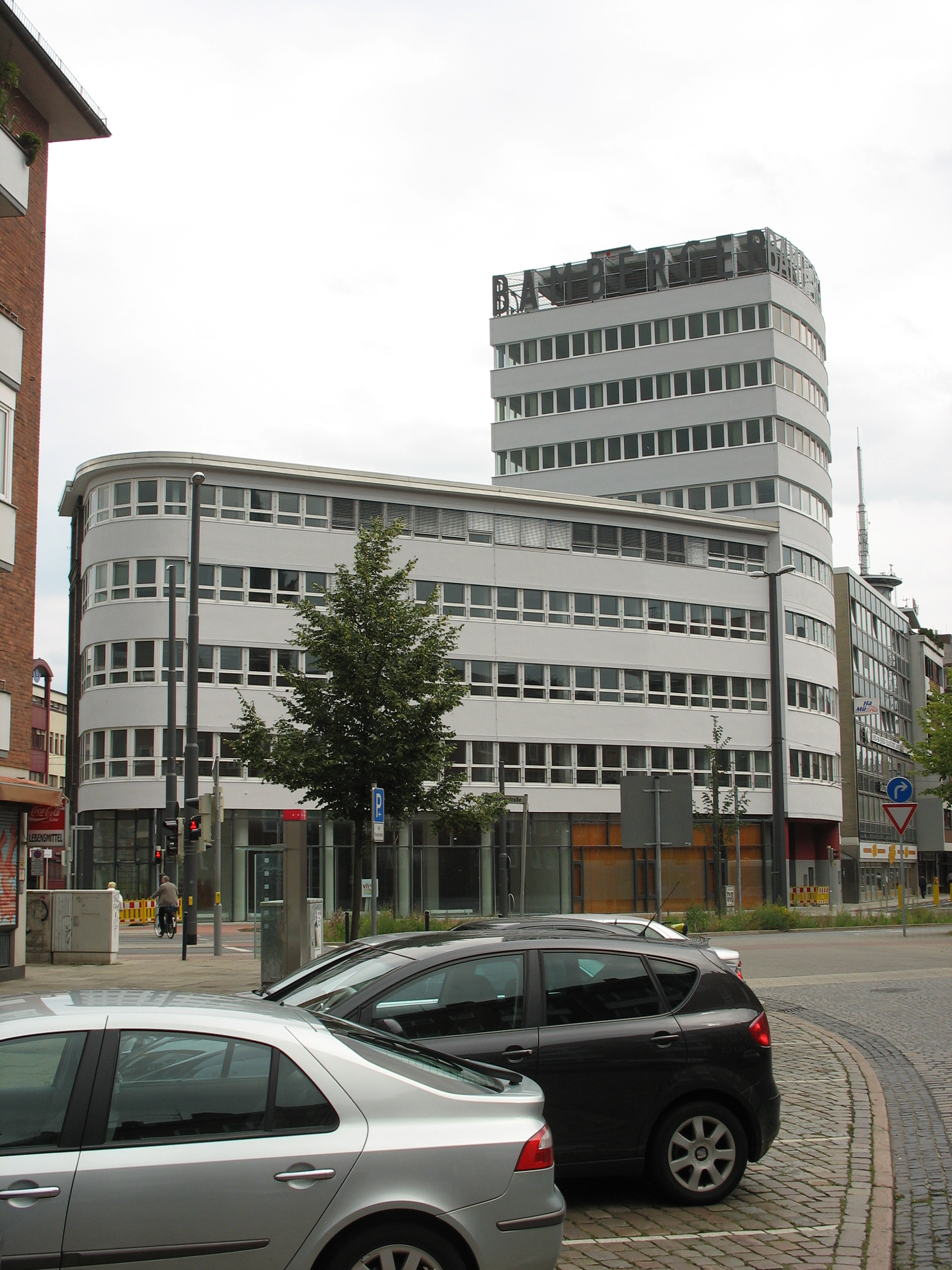 Kaufhaus Julius Bamberger, Bremen, Germany (von Westen)